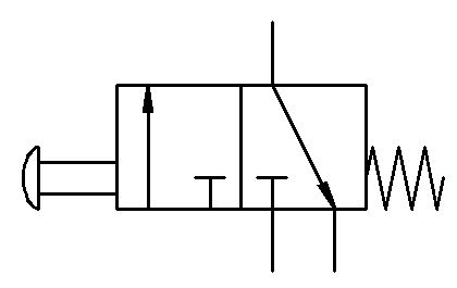 3/2 Wegeventil, federrückgestellt, manuell betätigt, in Grundstellung gesperrt ohne Anschlussbezeichnungen